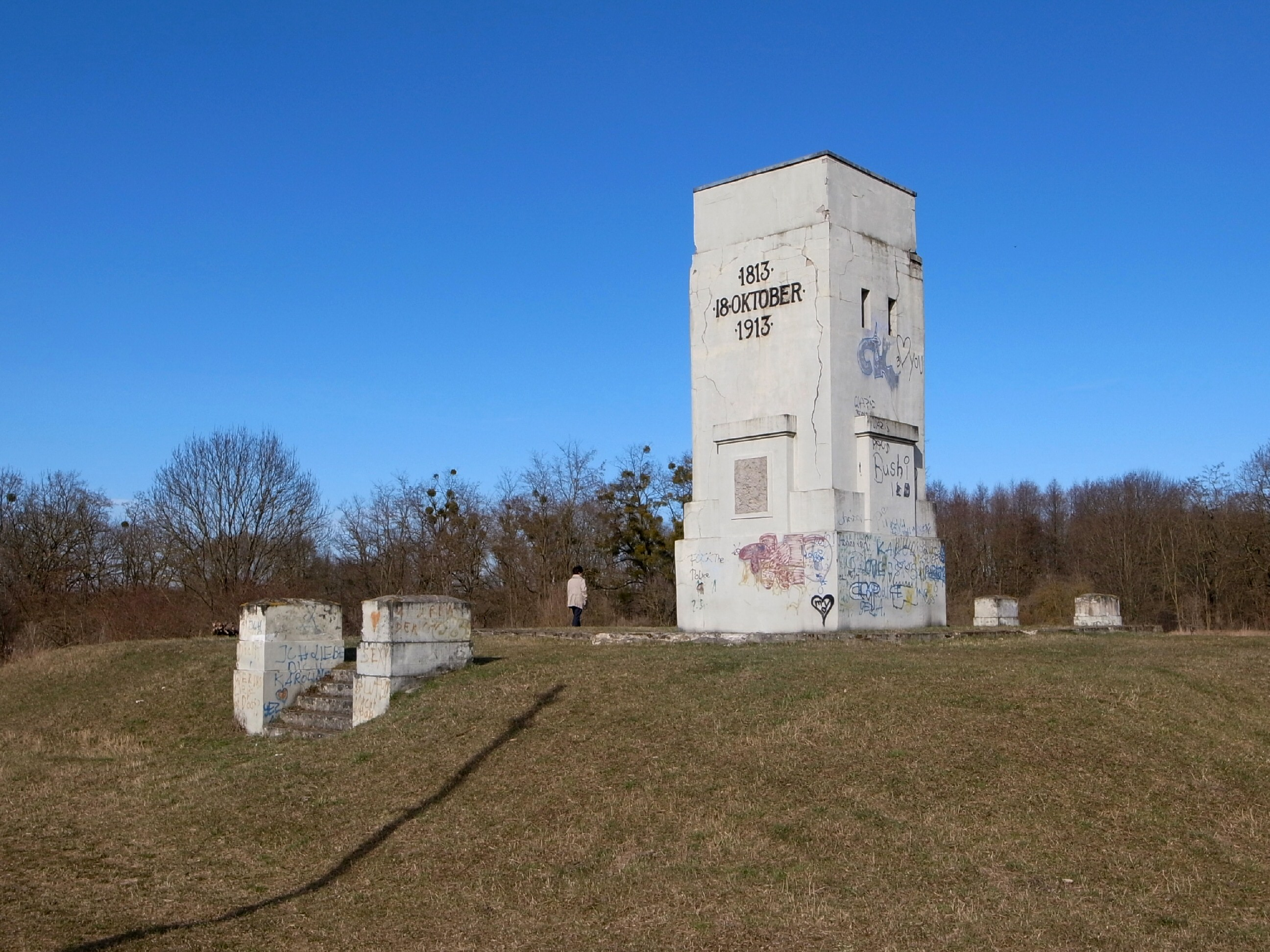 Zerbst, Feuersäule. Errichtet 1913 zur 100-jährigen Wiederkehr der Völkerschlacht bei Leipzig. (Quelle: volksstimme.de)